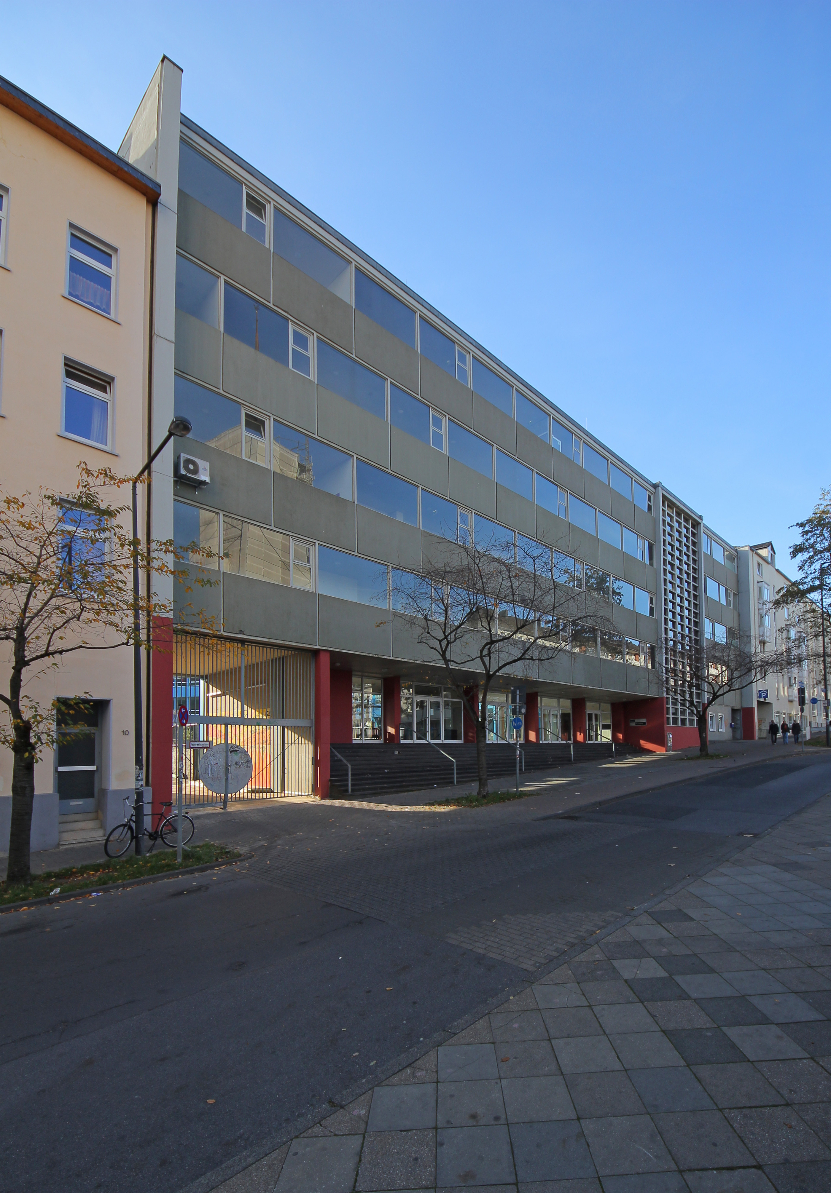 Viktoriaschule in der Warmweiherstraße, Aachen, NRW